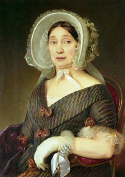 "Ritratto della contessa Ersilia Turrini Rossi Marsili", olio su tela, cm. 76 x 57, Musei civici, Bologna